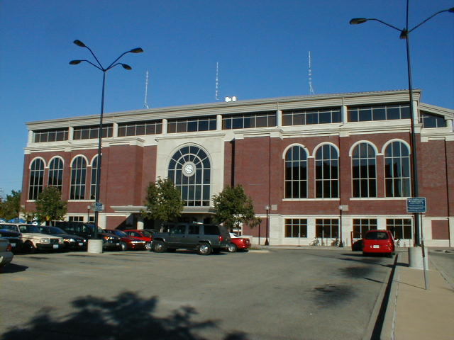 Illinois Terminal